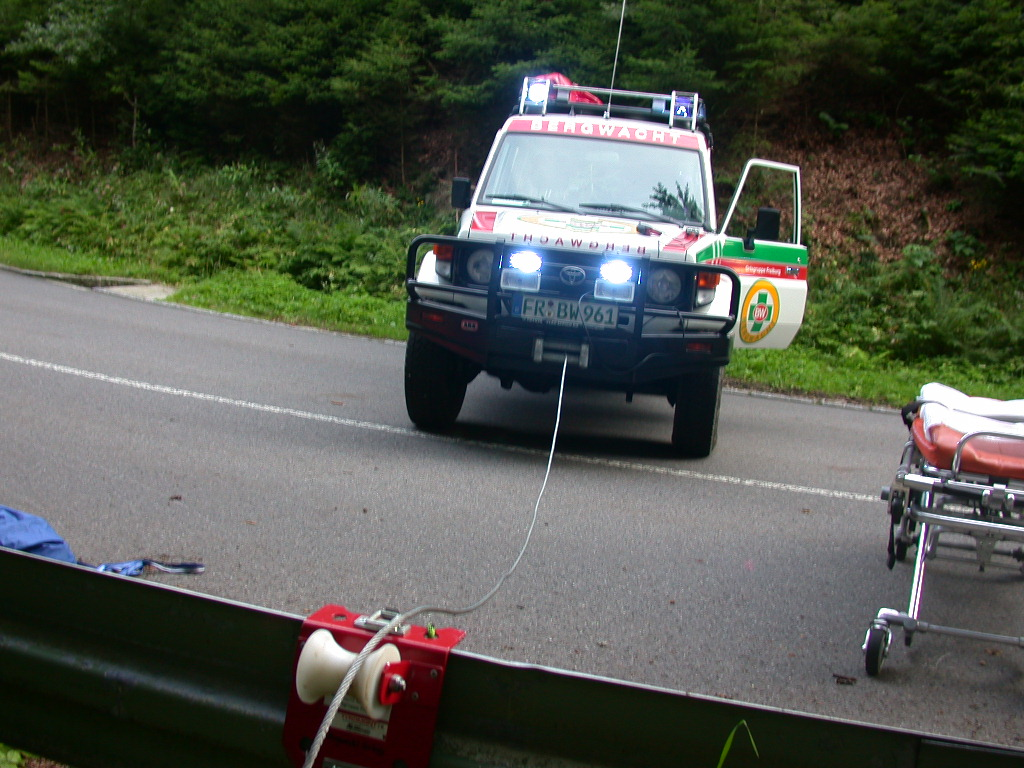 Einsatzfahrzeug (Toyota Landcruiser) der Bergwacht Schwarzwald e.V. (BWS) - Einsatz der Winde zur Patientenrettung rescue vehicle (Toyota Landcruiser) of German Black Forest Mountain Rescue (BWS) - winch